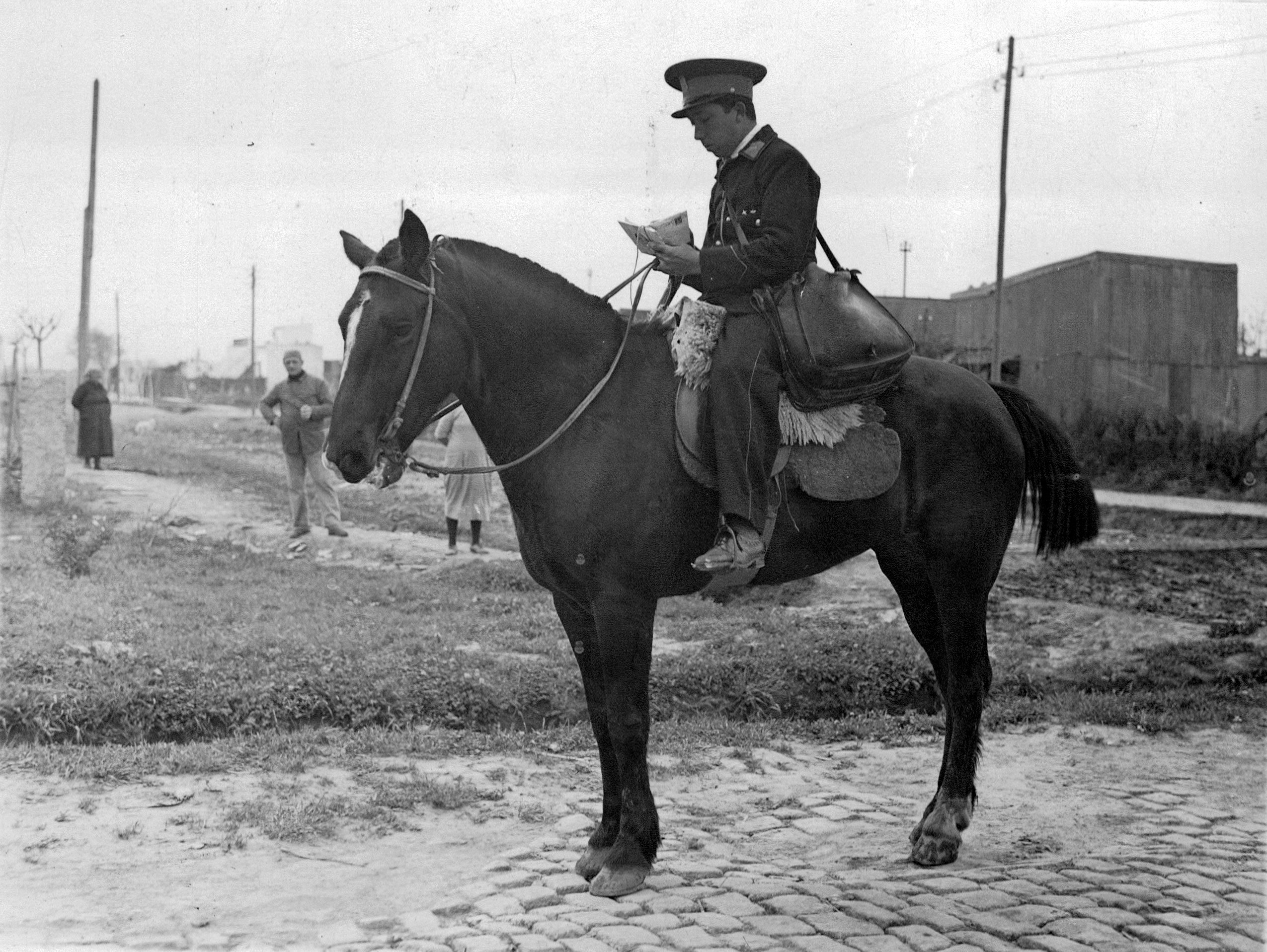 Provincia de Buenos Aires, el cartero, c.1920. Inventario 323045.